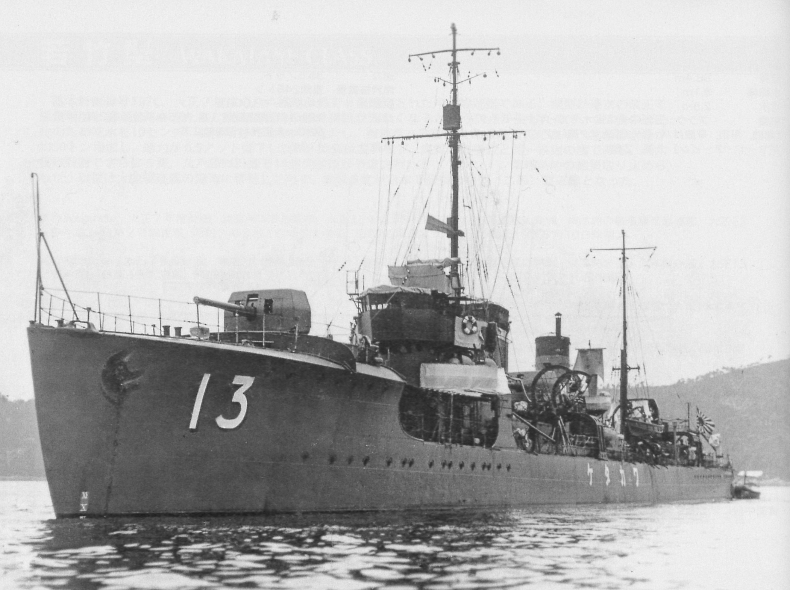 昭和5年、第一水雷戦隊に編入当時の「若竹」